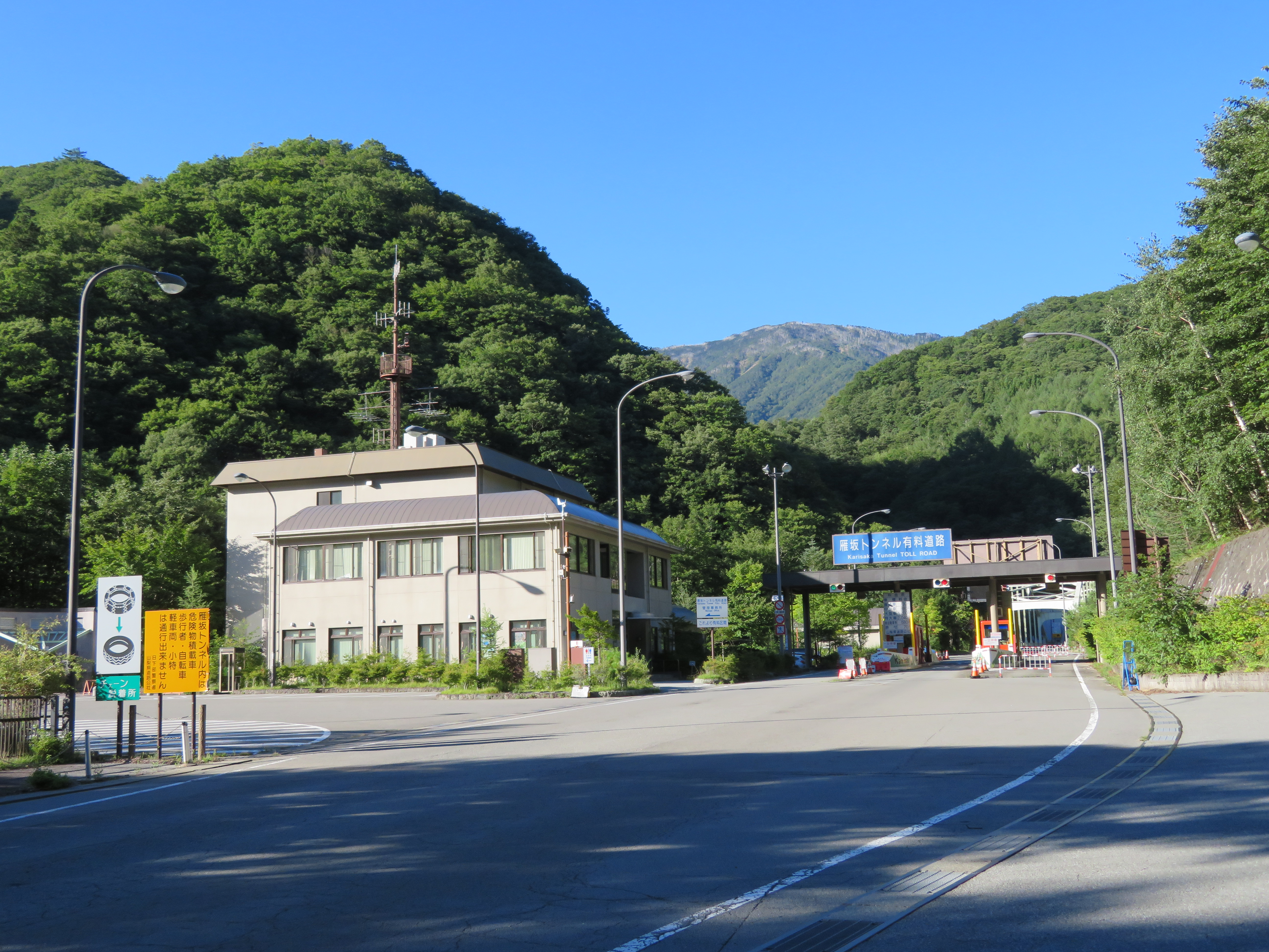 国道140号線雁坂トンネル有料道路料金所と管理事務所 Canon PowerShot SX720 HS